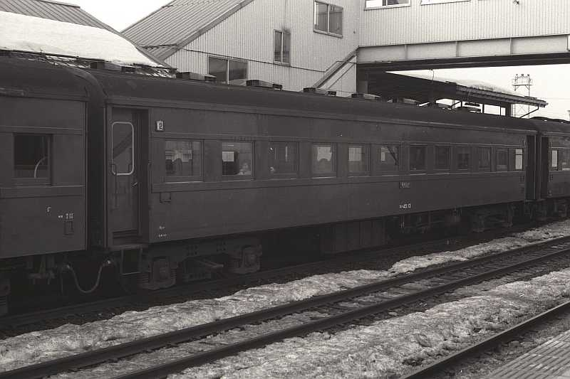 JNR Passenger car. Suha45 13（国鉄スハ45 13）